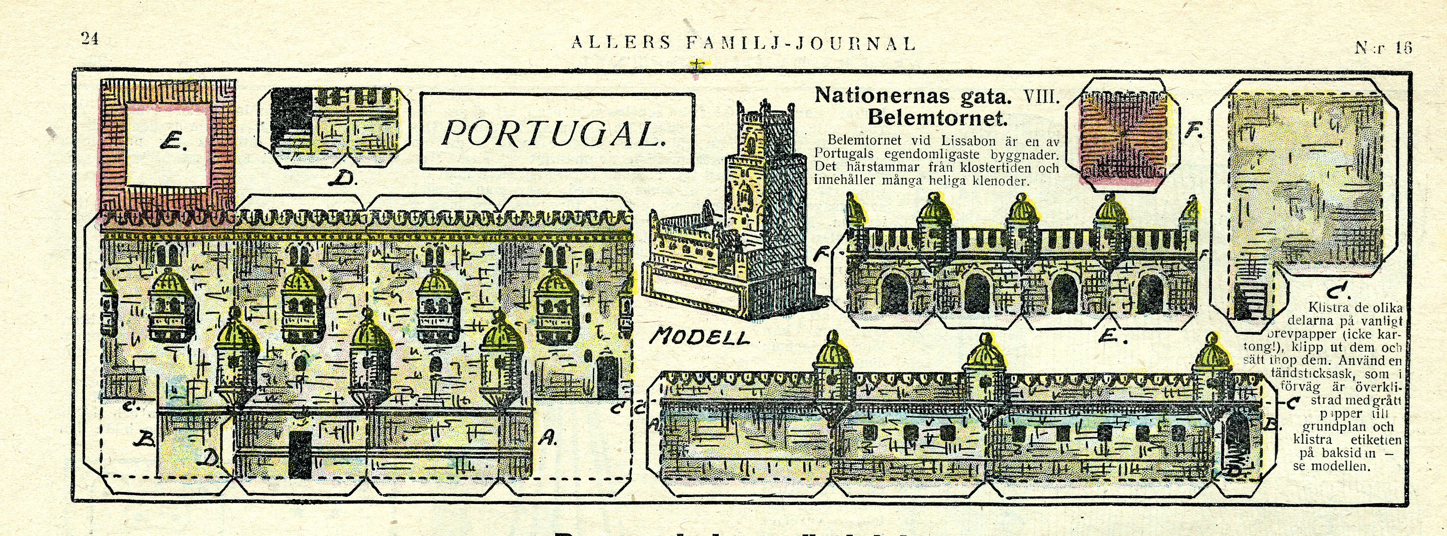 Detta klippark ingick i den första serien "Nationernas Gata" som H. C. Madsen ritade för Allers 1918-1919. Det föreställer Belemtornet vid Lissabon och skulle liksom de andra modellerna i serien monteras på en tändsticksask. Trycktes i svenska upplagan av Allers nr 16 år 1919.